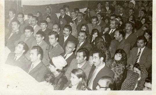 سینما سعدی بوکان در دهه 40 خورشیدی